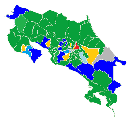 Resultado elecciones de alcaldes Costa Rica 2016